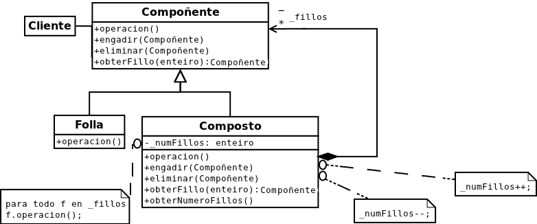 Diagrama dunha variante do patrón composite no que o composto coñece o número de fillos que ten